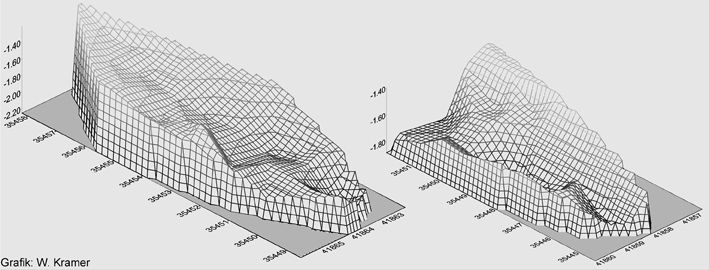 Tegelnoor Wracks: 3d-Kartierung der festgestellten Auftrefftiefen